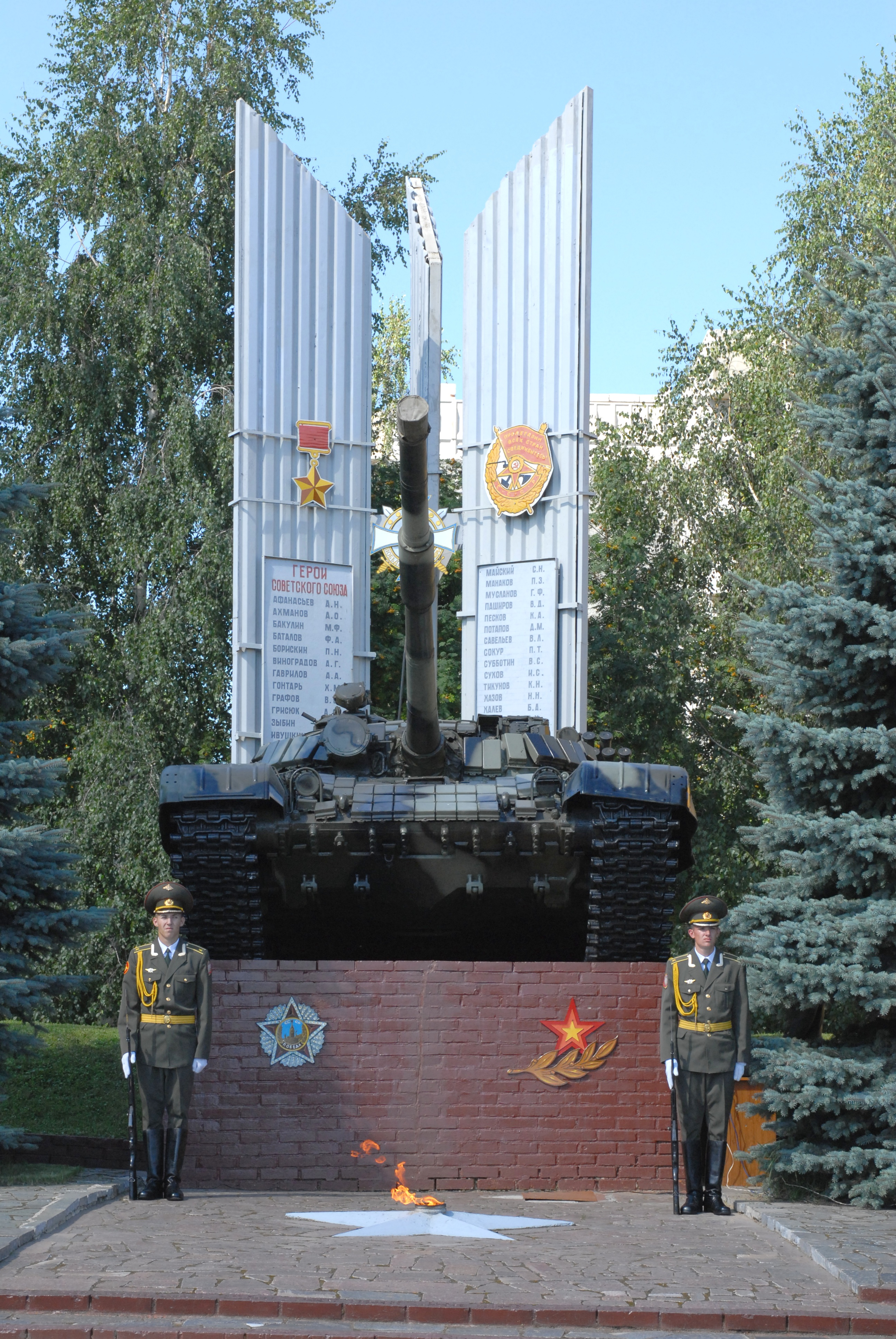 Вечный огонь. Танк Т-80. Казанское Танковое училище